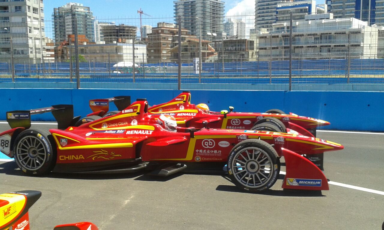 aaaaa